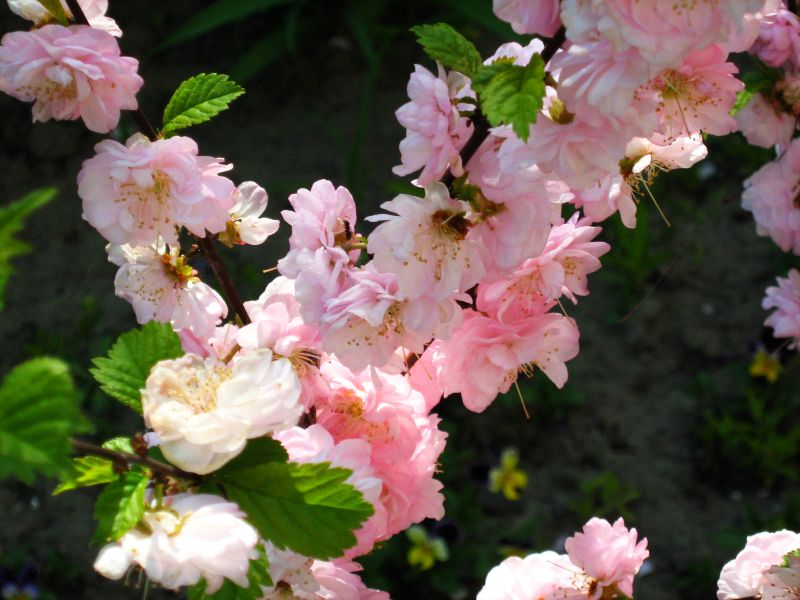 Migdałowiec trójklapowy (Prunus triloba Lindley, syn. Amygdalus triloba (Lindley) Spach) z mojego ogrodu